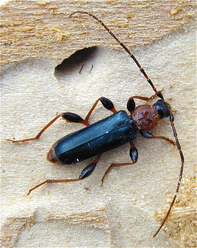 Phymatodes testaceus